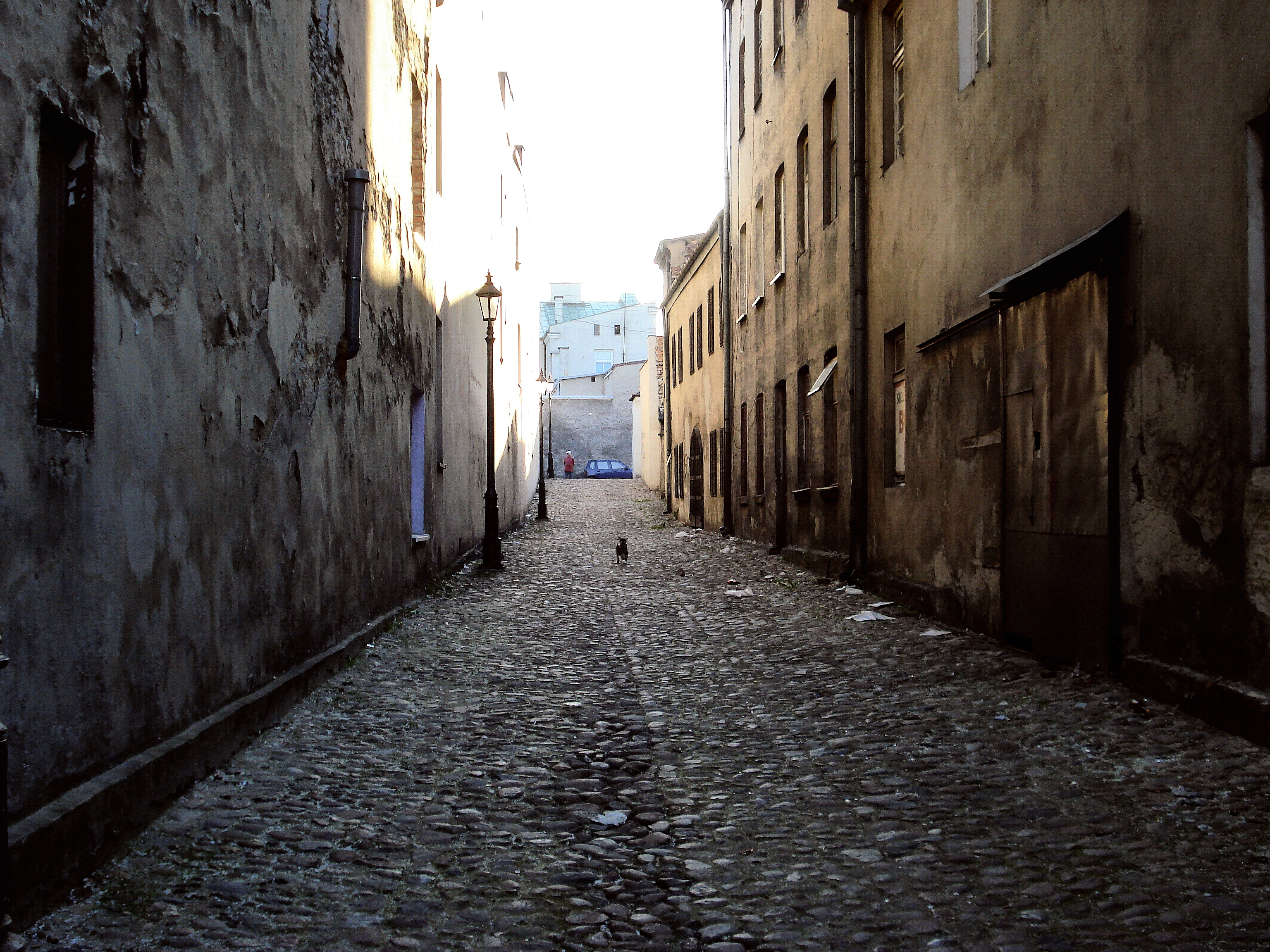 Ulica Graniczna na Starym Mieście w Częstochowie Unknown